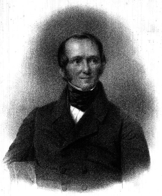 Ernst von Bodelschwingh (1794–1854)